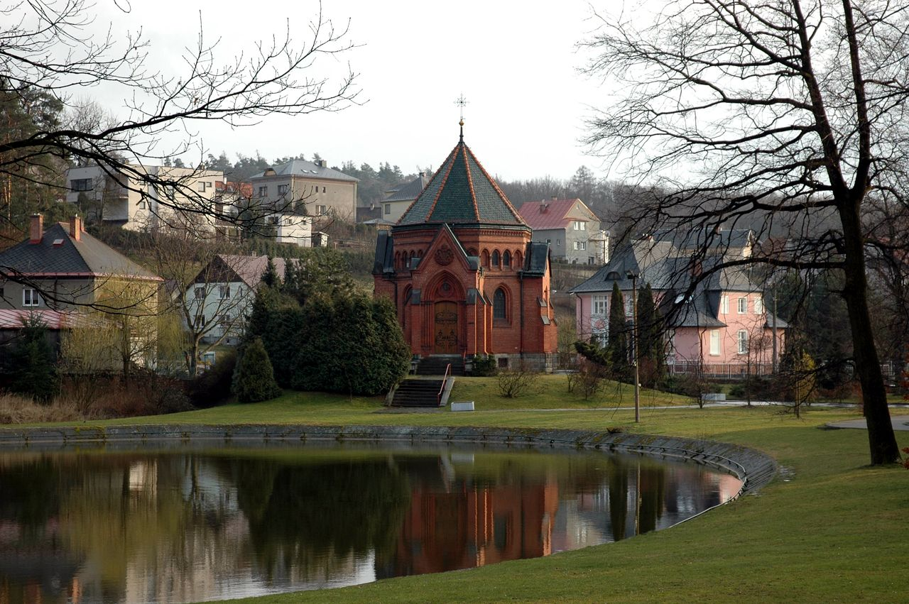 Kaple sv. Kříže, Chuchelná)